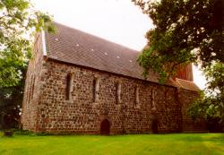 Foto der mittelalterlichen Kirche in Bechlin, Neuruppin, Deutschland. Mehr info unter